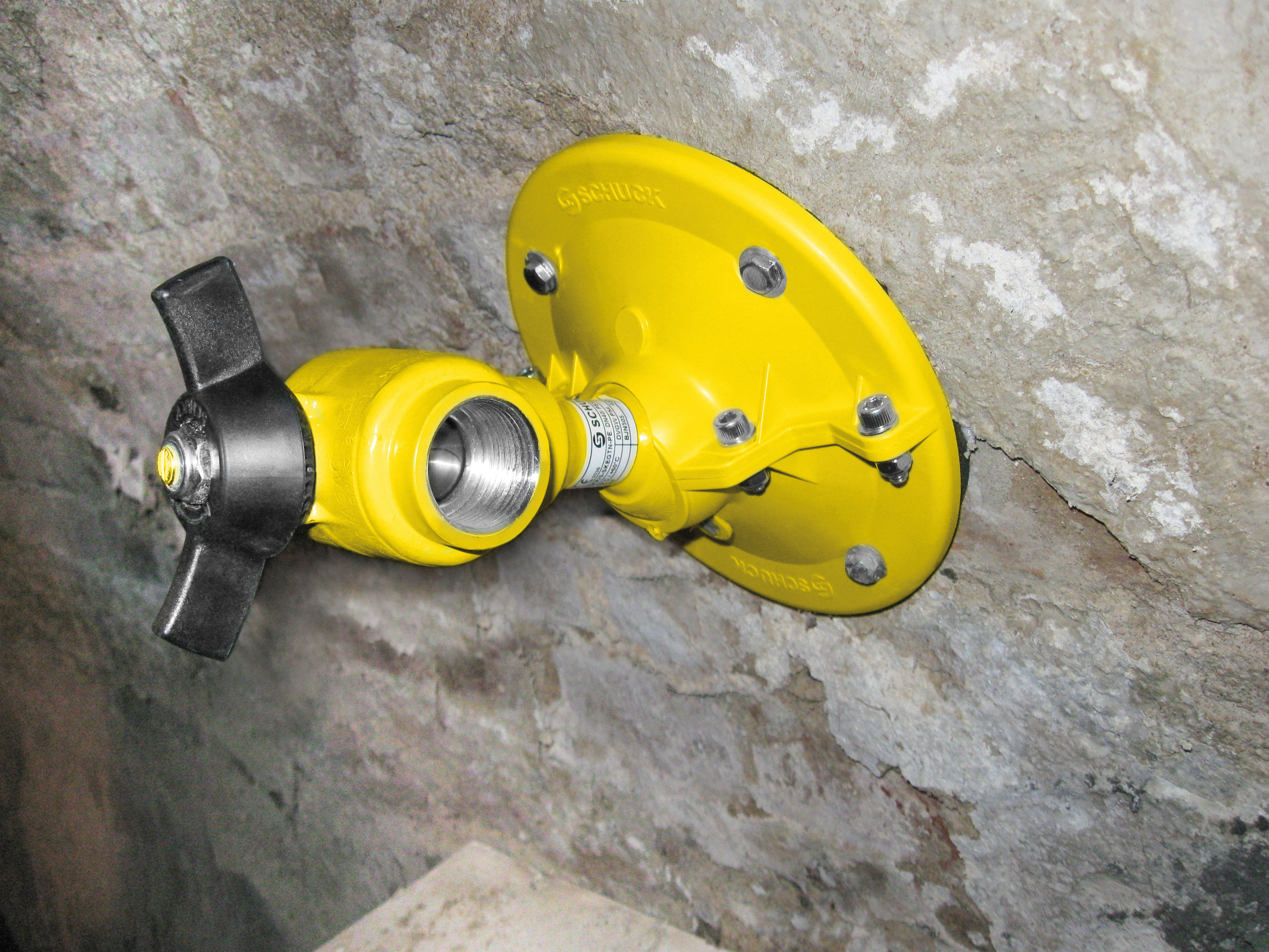 Schuck Sanierungskapsel Sanova mit schwenkbarer Montageplatte in Gewölbekeller